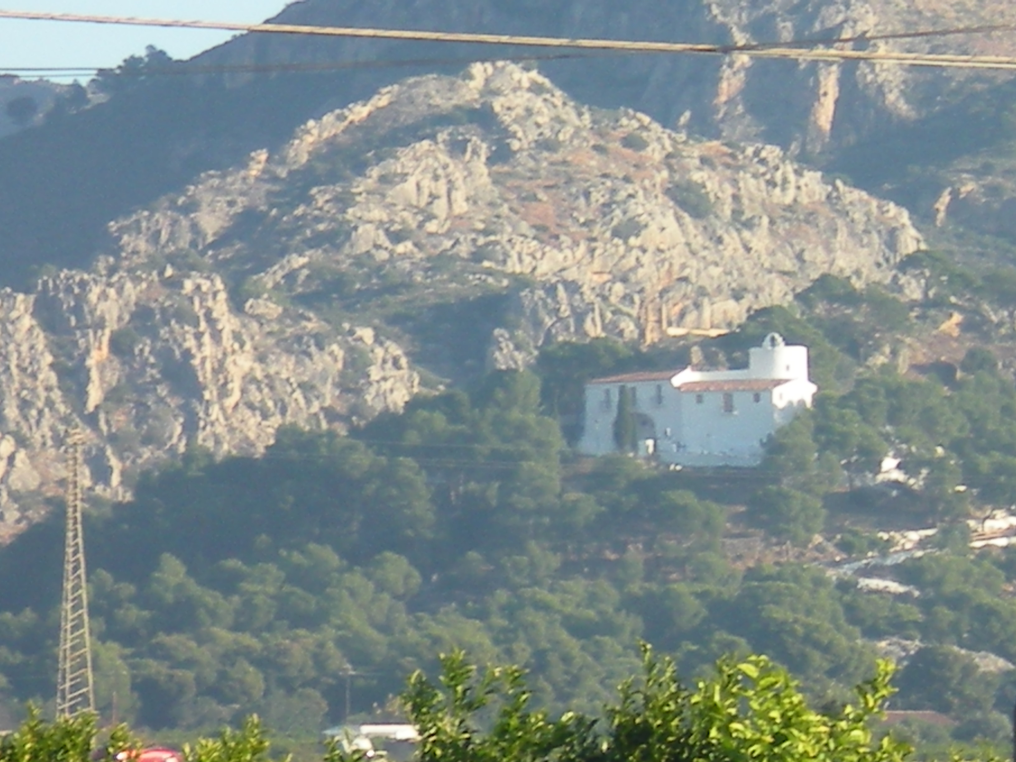 Ermita de Santa María Magdalena, ubicada en el cerro homónimo de Castellón de la Plana.